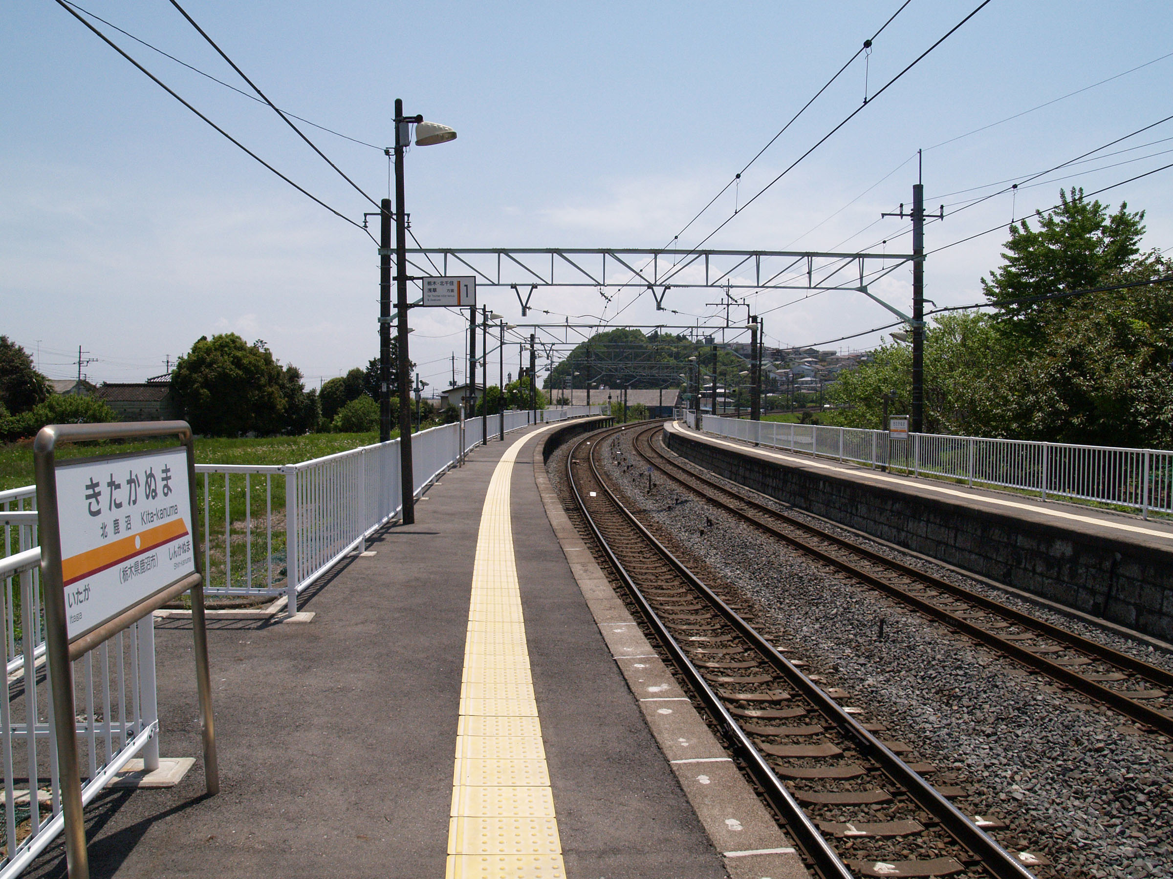 北鹿沼駅ホーム